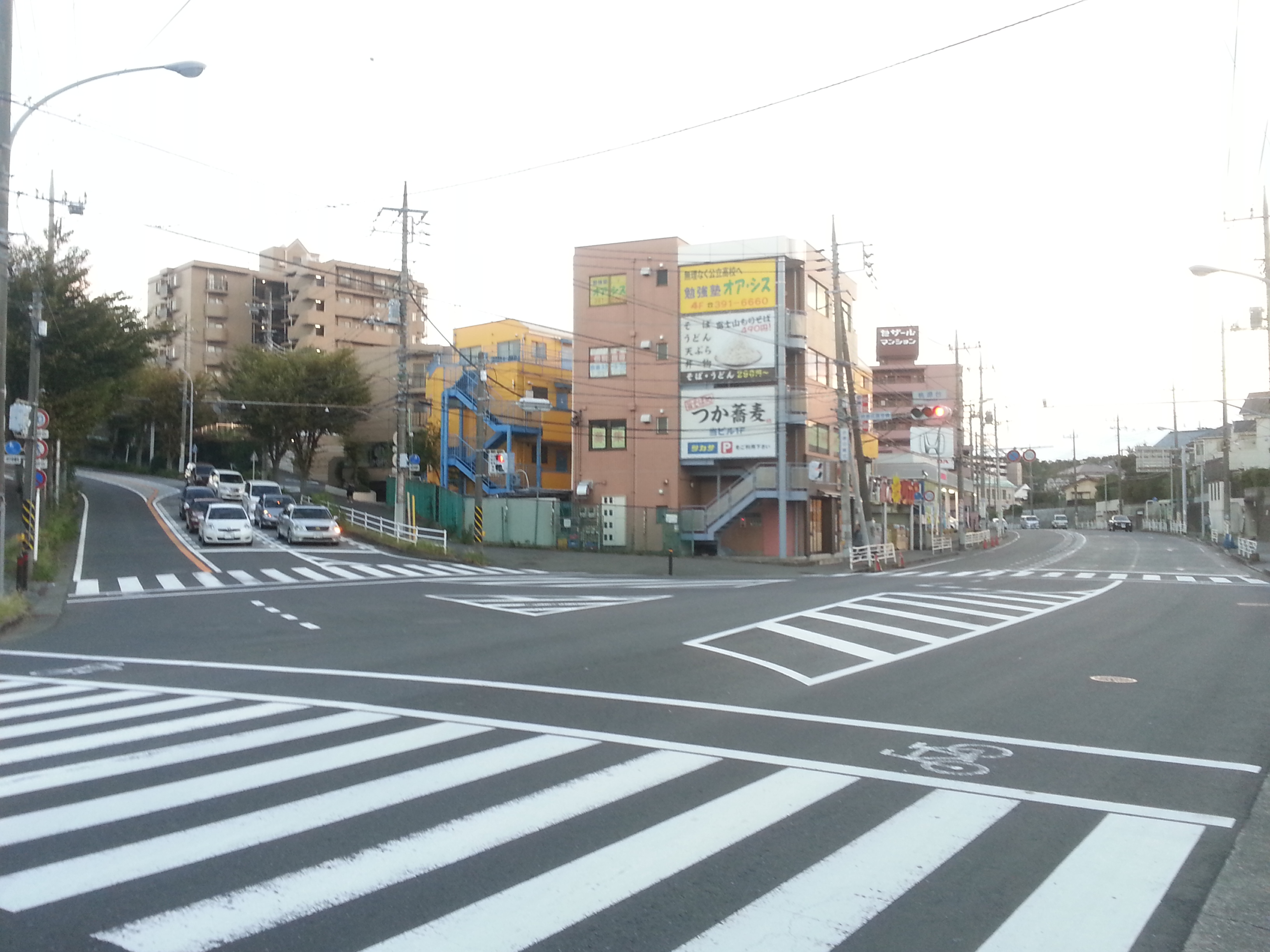 横浜市都市計画道路「鴨居上飯田線」と「中田さちが丘線」の接続部。写真左の道が「中田さちが丘線」の終点、「鴨居上飯田線」は写真右方向（直進）へ続く。